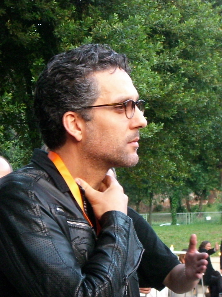 L'attore italiano Beppe Fiorello